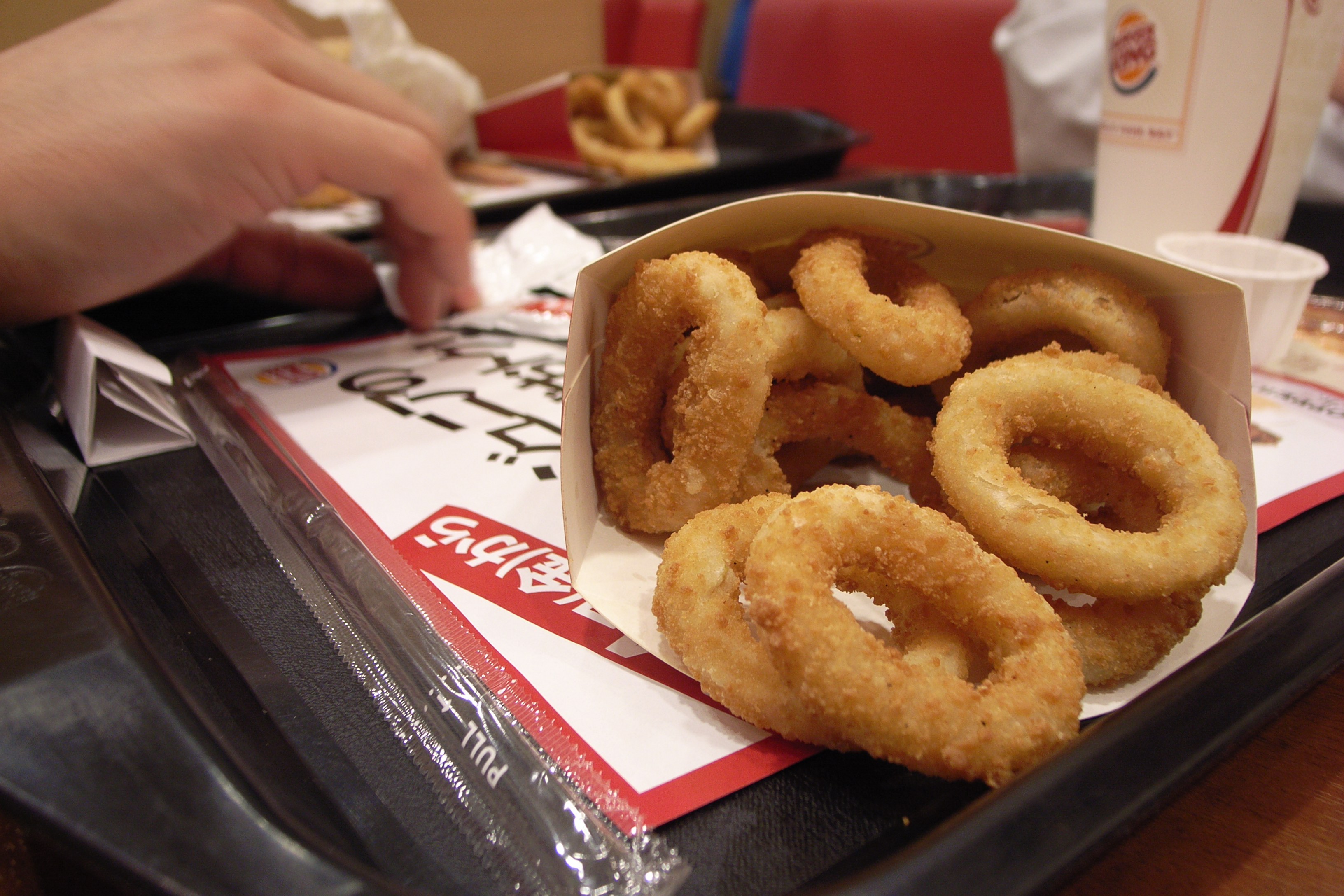 BURGER KING